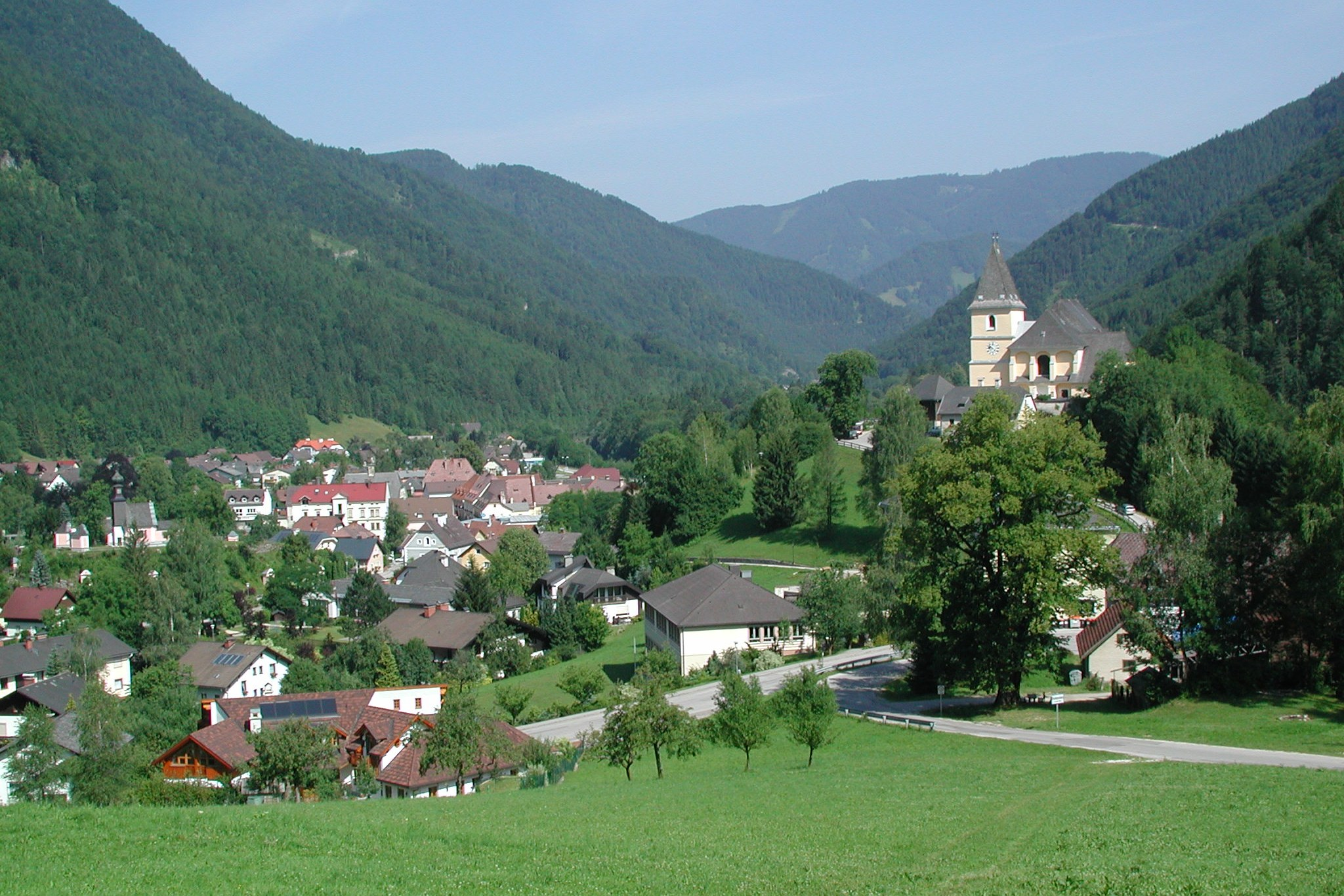 Description: Hollenstein an der Ybbs in Lower Austria - Hollenstein an der Ybbs in Niederösterreich own image - eigene Aufnahme, July 01, 2000 Photographer: Herbert Ortner, Vienna, Austria